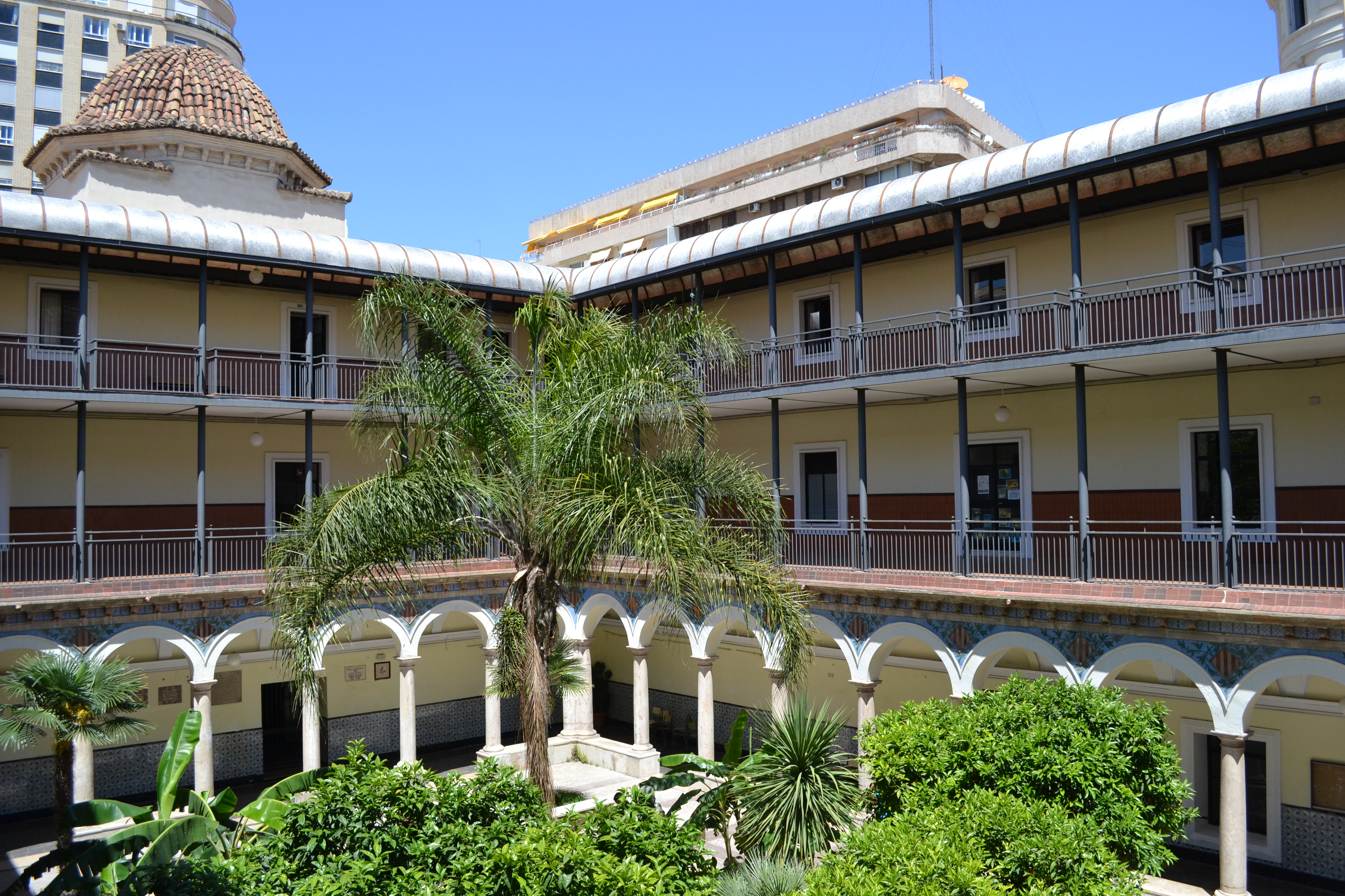 Vista del claustro del Instituto de Enseñanza Secundaria Luis Vives de Valencia. Reunión de wikimedistas en Valencia el 25 de mayo de 2013.